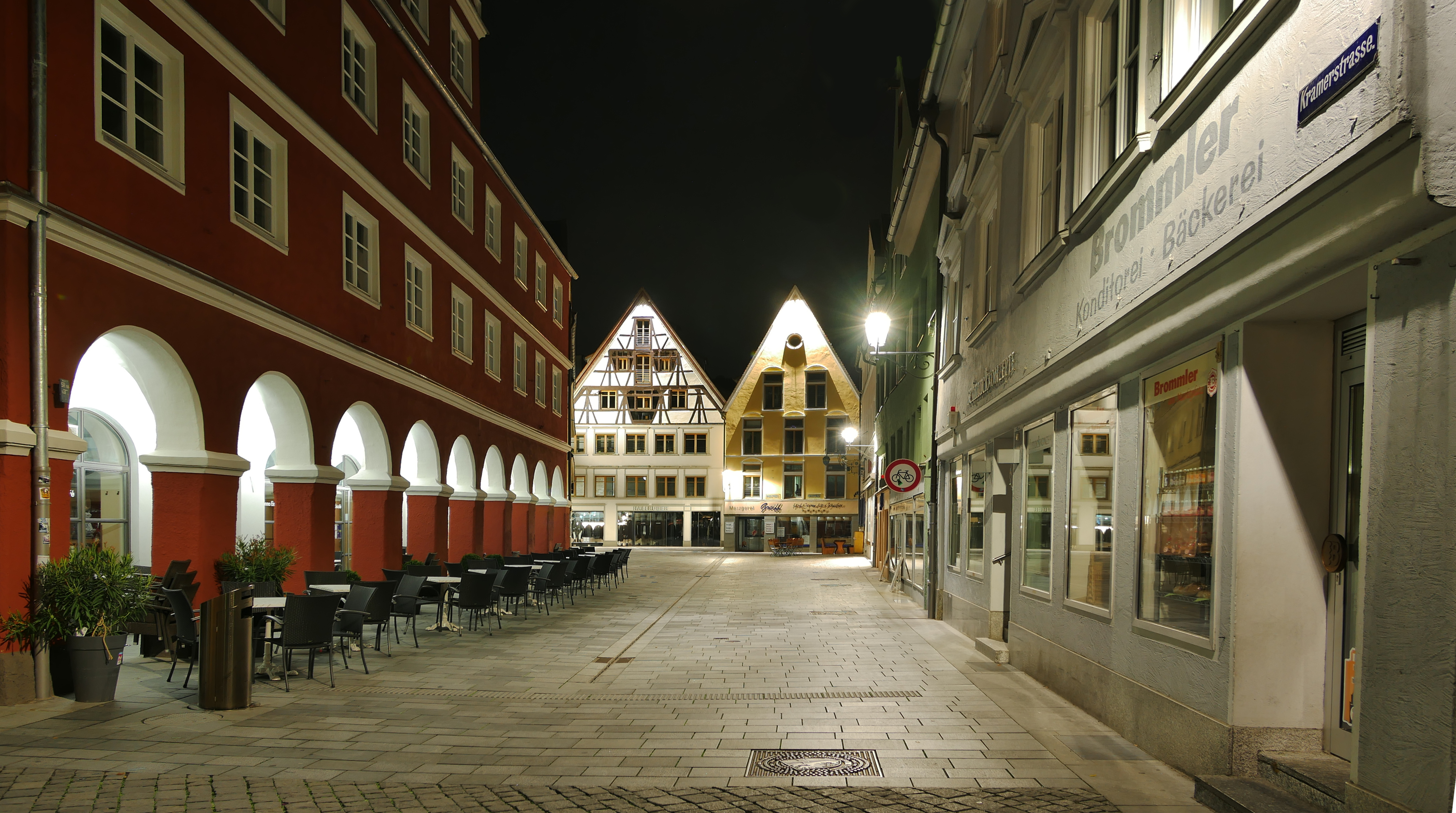 Eingang in die Kramerstraße in Memmingen - Blick vom Marktplatz in die Kramerstraße